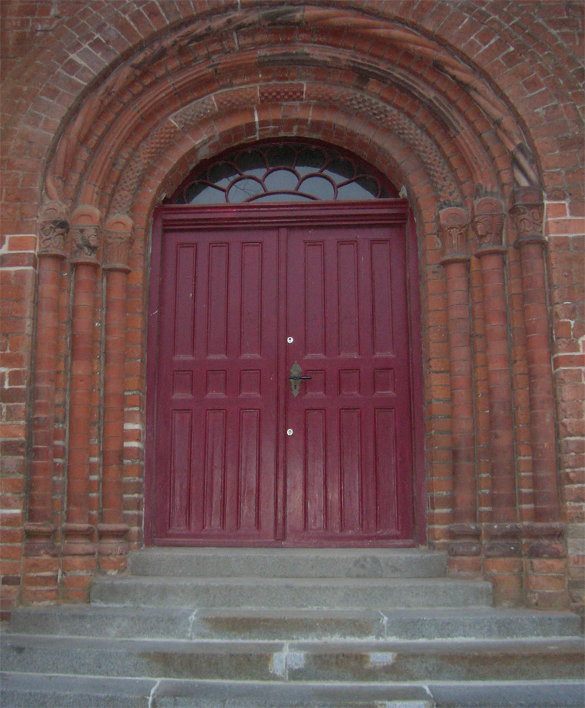 Südportal der Stadtkirche Gadebusch